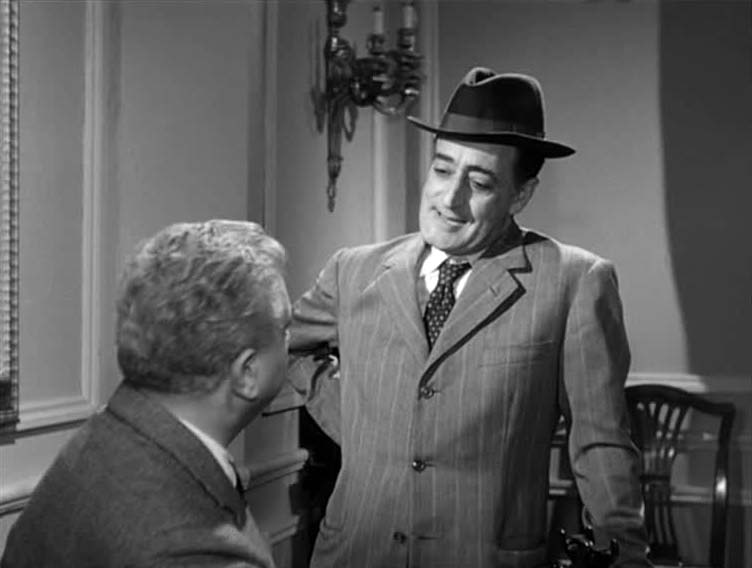 Screenshot del film Il coraggio, regia di Domenico Paolella, 1955. Categoria:Immagini di Gino Cervi Categoria:Immagini di Antonio De Curtis